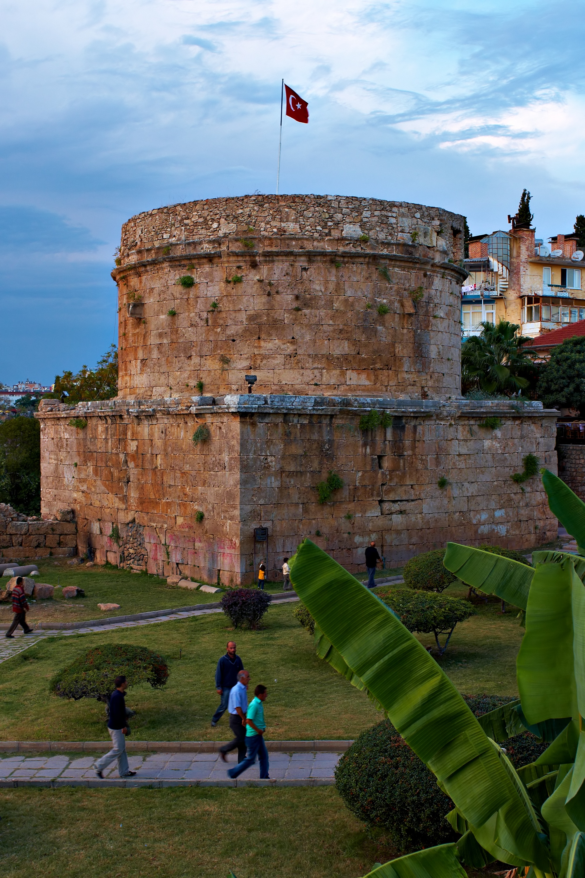 Hidirlik tower in Antalya